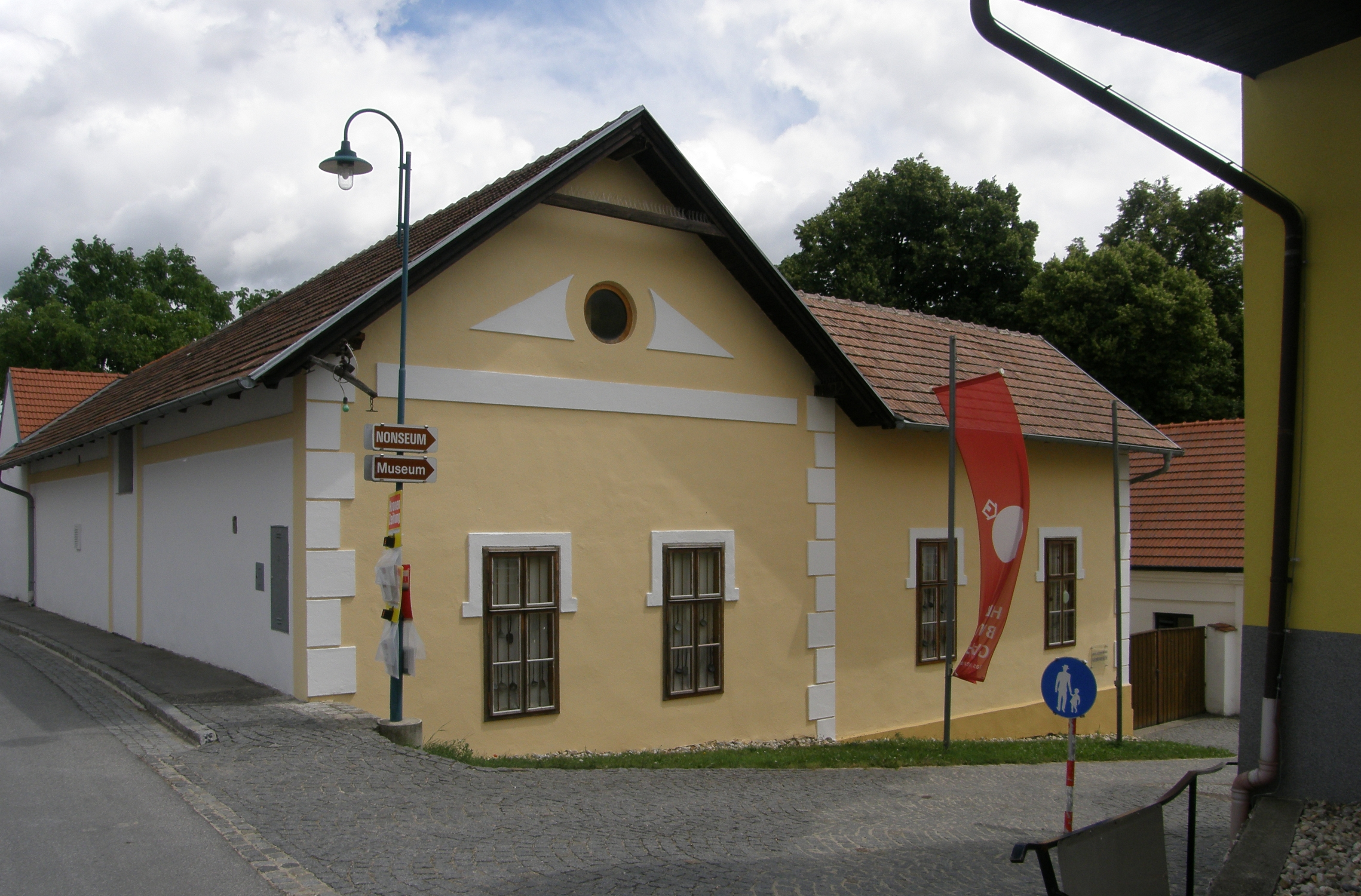 Dorfmuseum/Johann Schodl-Heimatmuseum